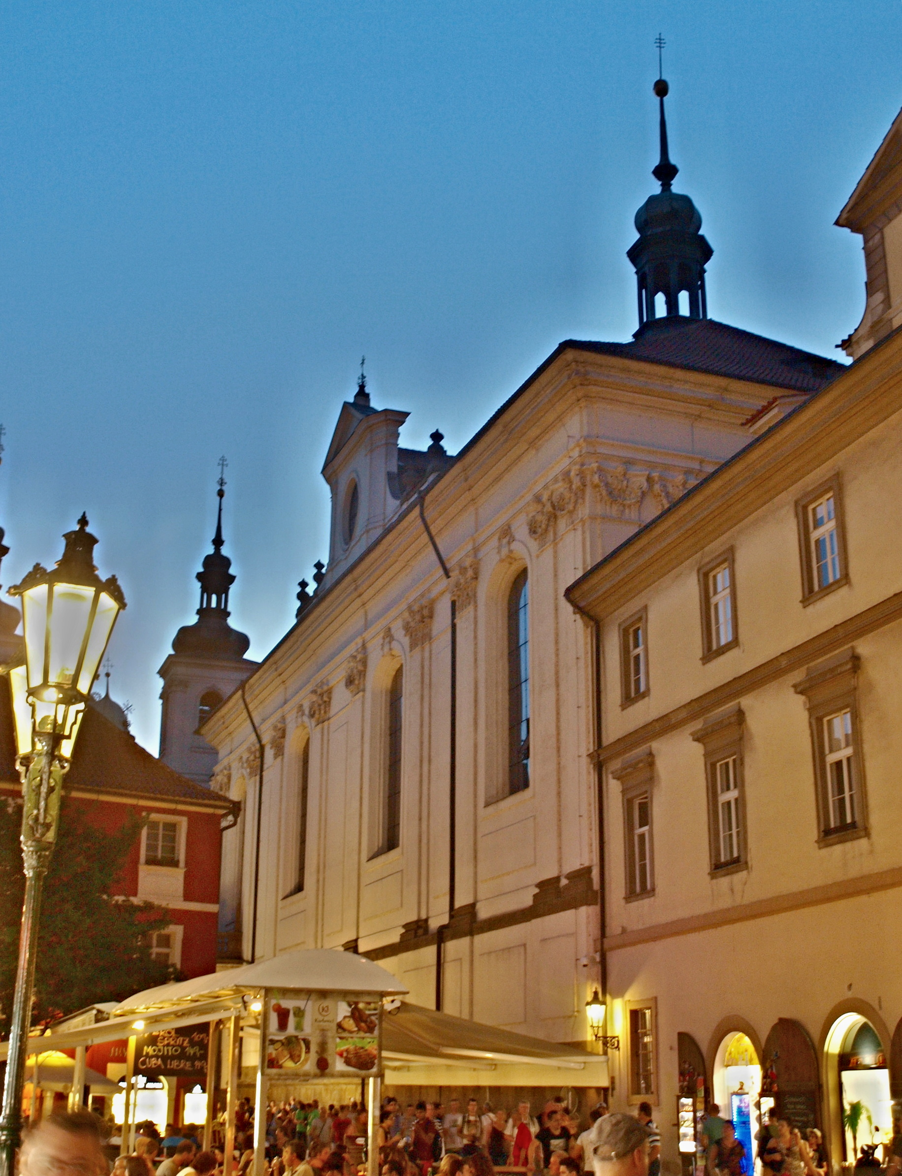 Kostel sv. Klimenta v Klementinu